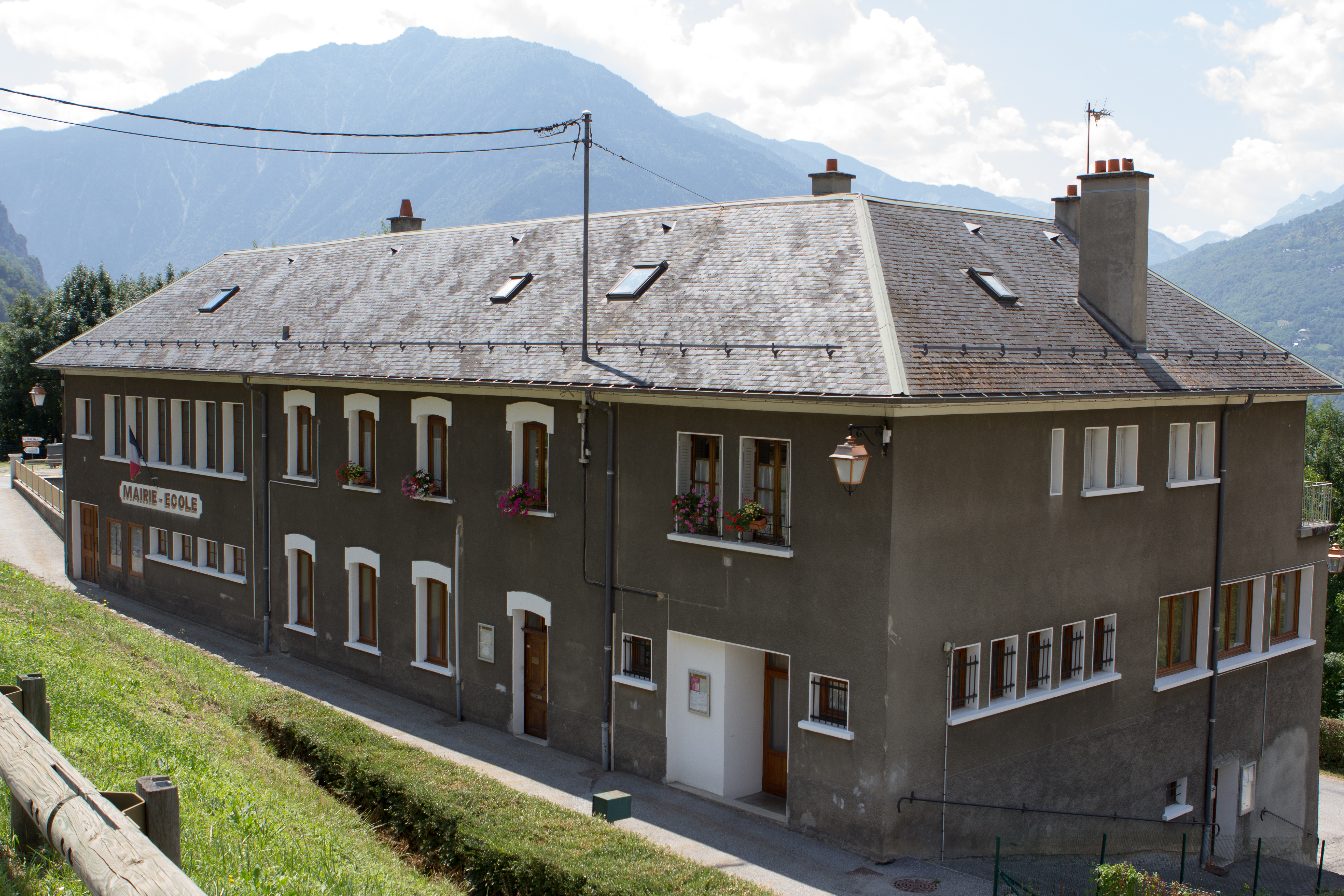 Mairie et école de Saint-Martin-sur-la-Chambre / Saint-Martin-sur-la-Chambre / Savoie / France